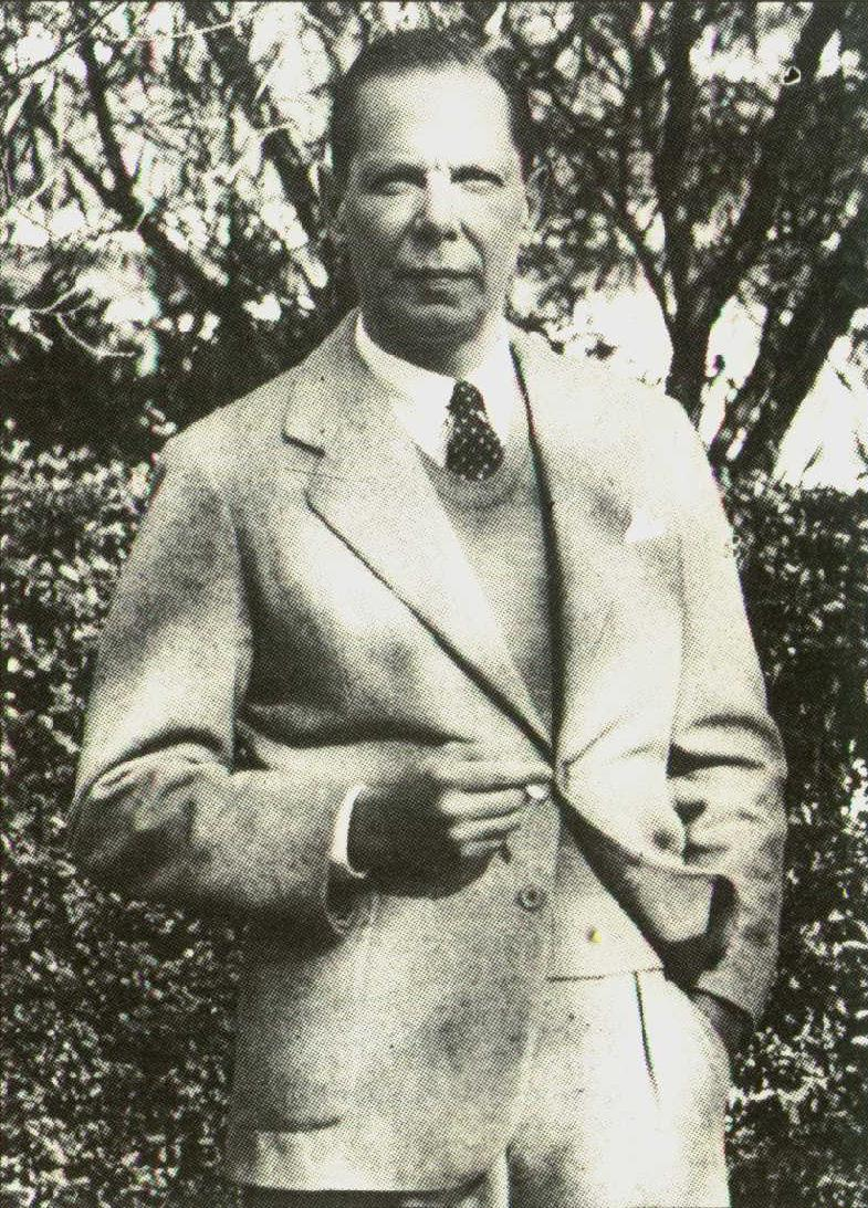 Argentine architect Alberto Prebisch (1899 - 1970)